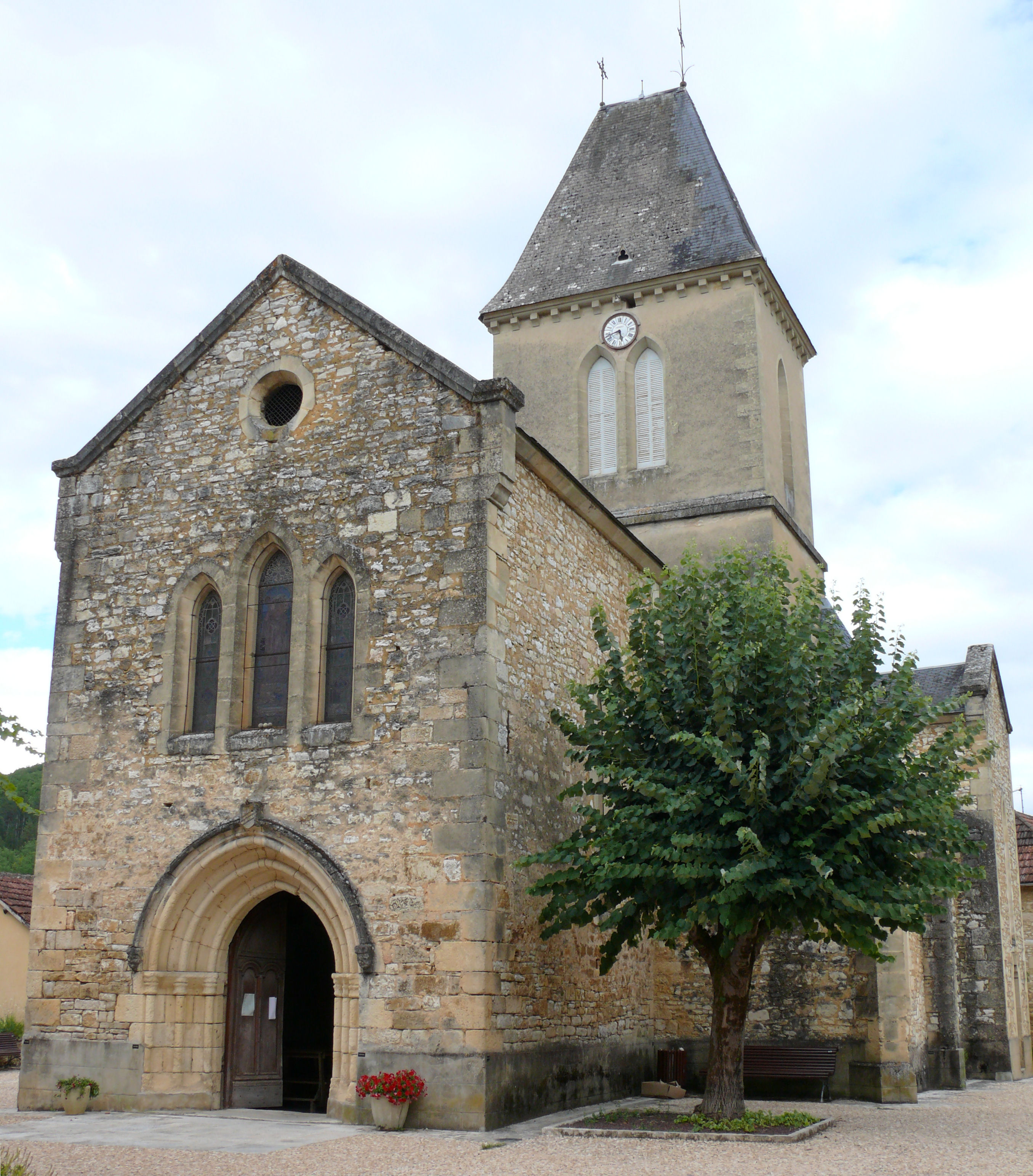 Daglan - Eglise